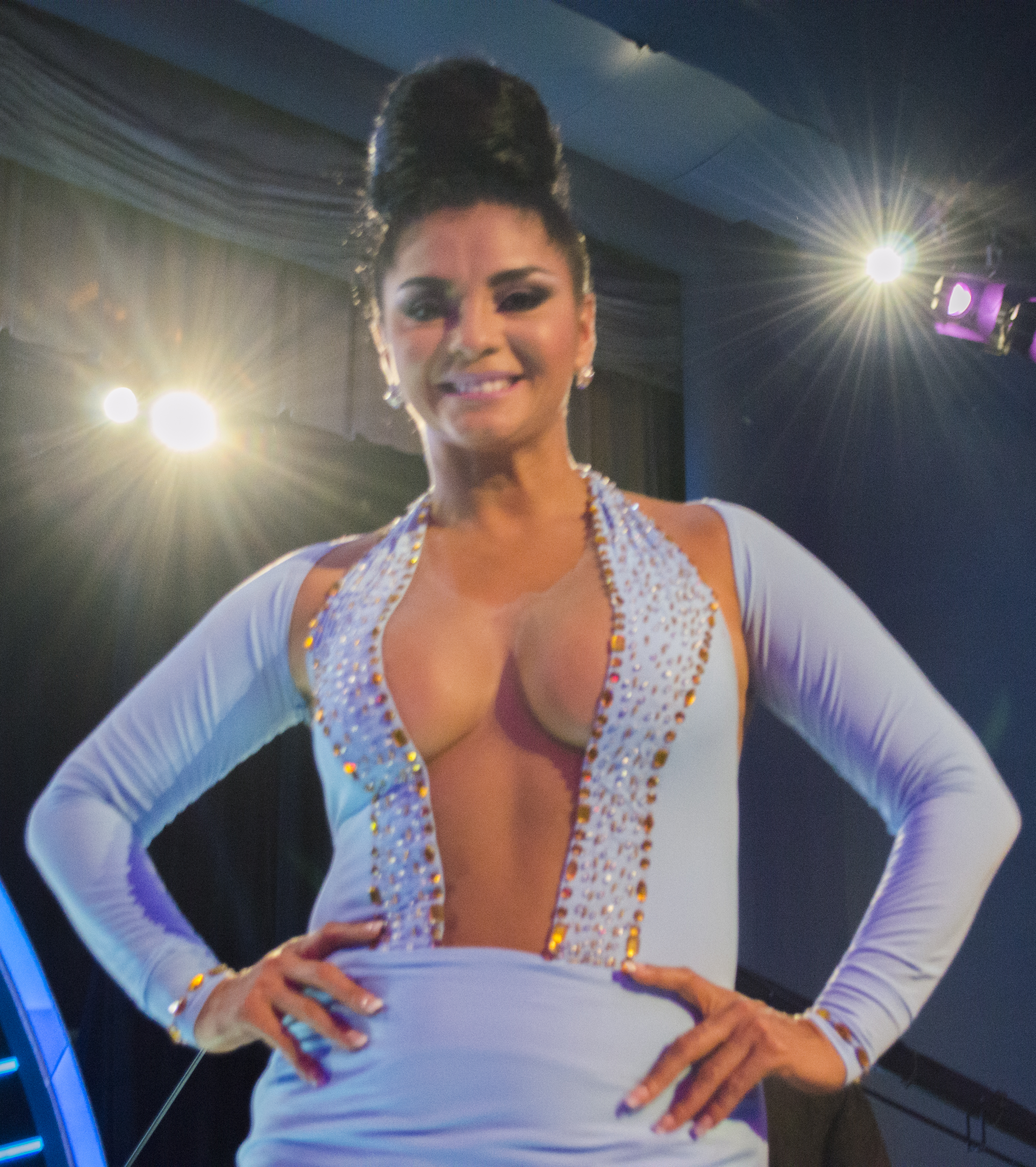 Paola Farías como jurado de Ecuador Tiene Talento 3 el 26 de octubre de 2014.